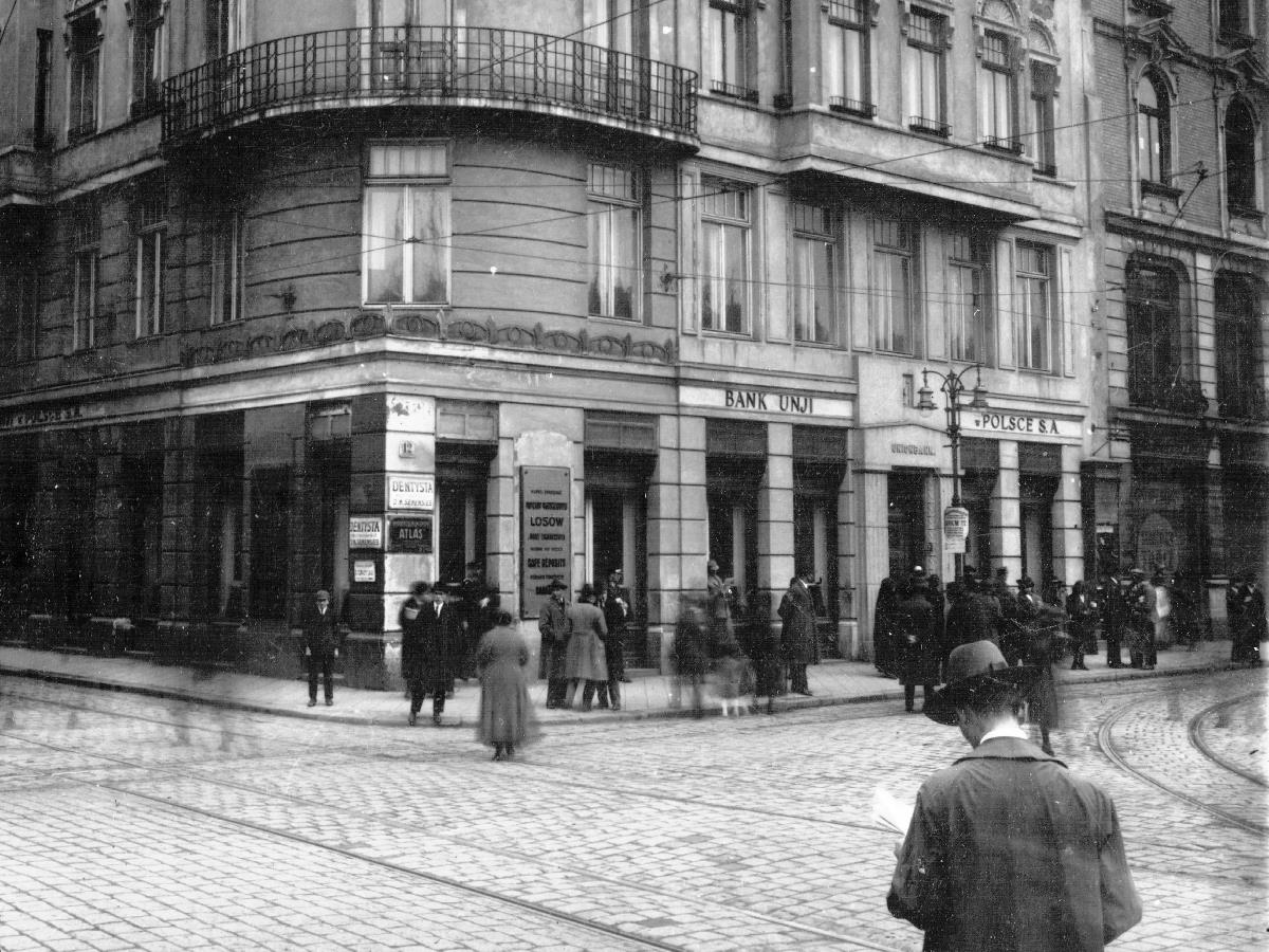 На розі вулиць Гетманській і Кілінського у Львові.